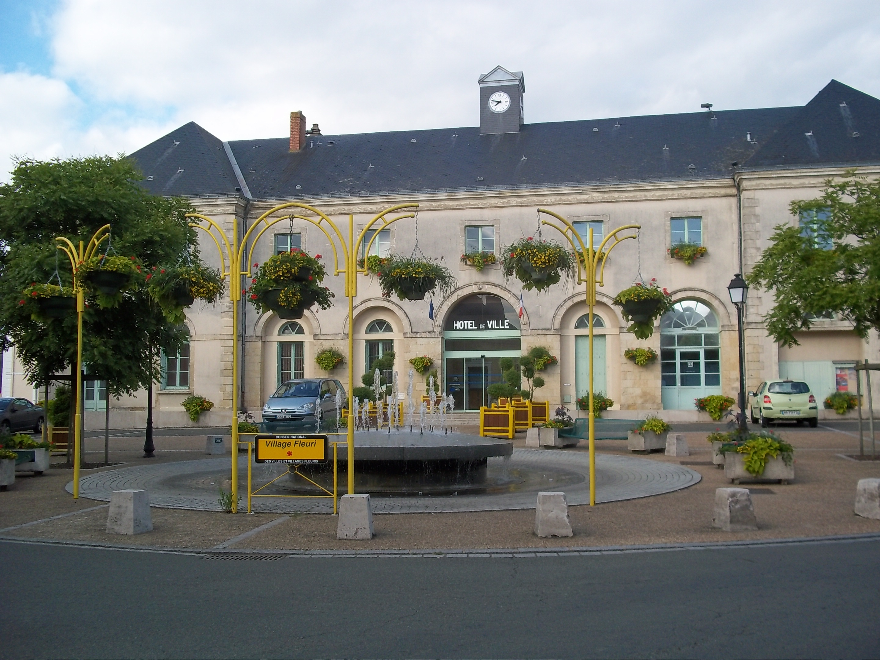 mairie